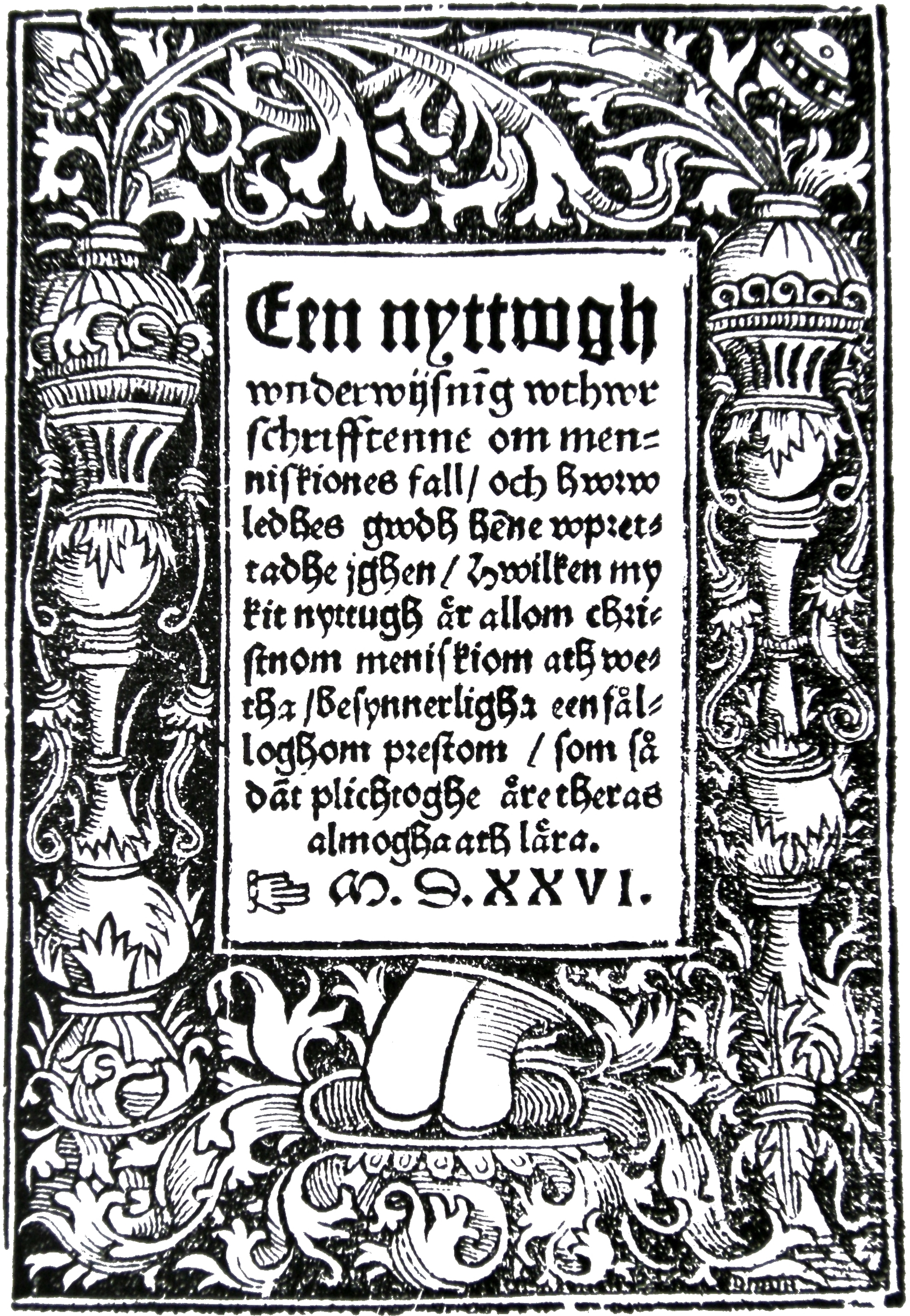 Blad ur En nyttwgh wnderwijsning. Stockholm 1526